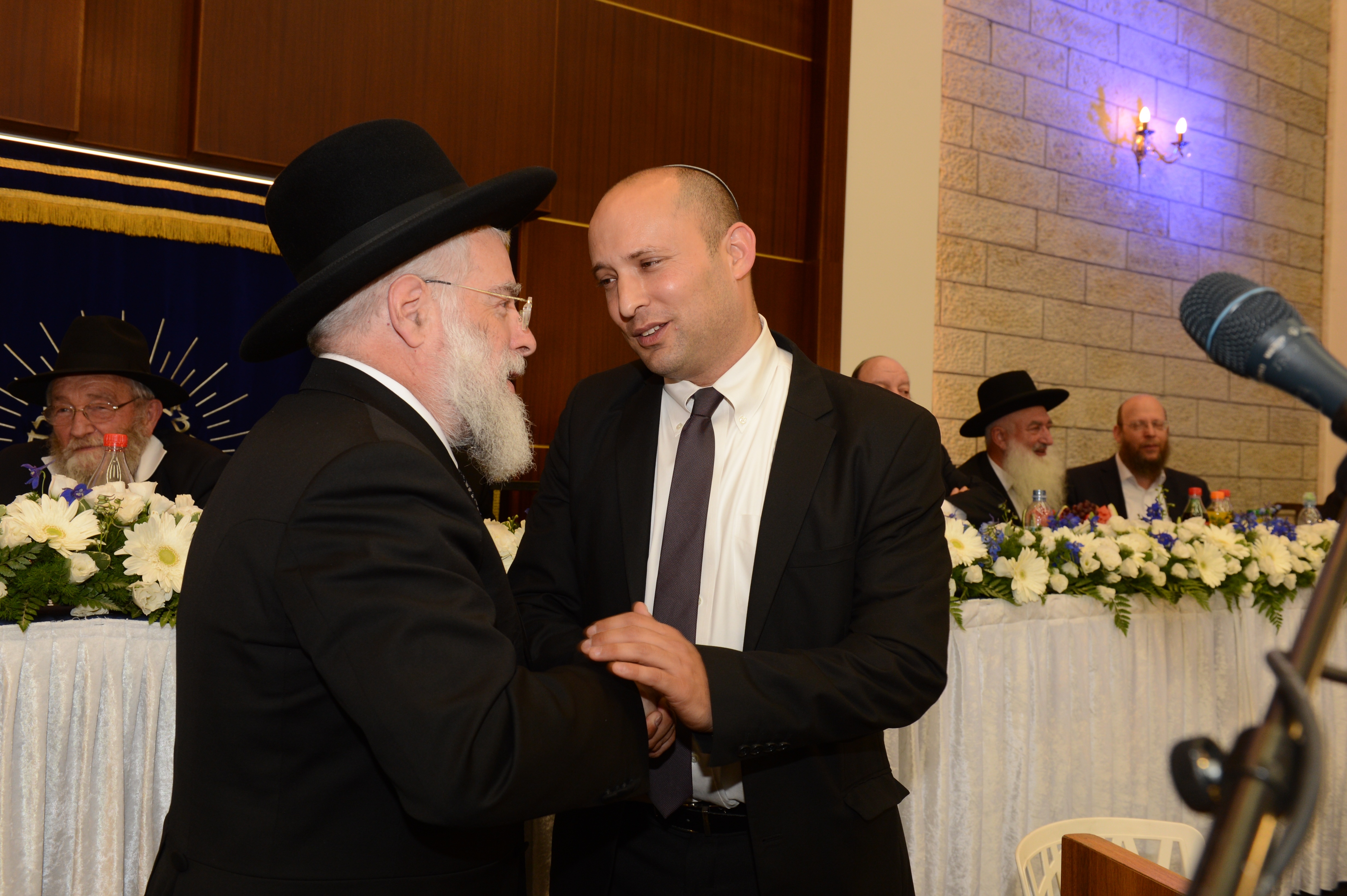 הרב יעקב שפירא יחד עם נפתלי בנט